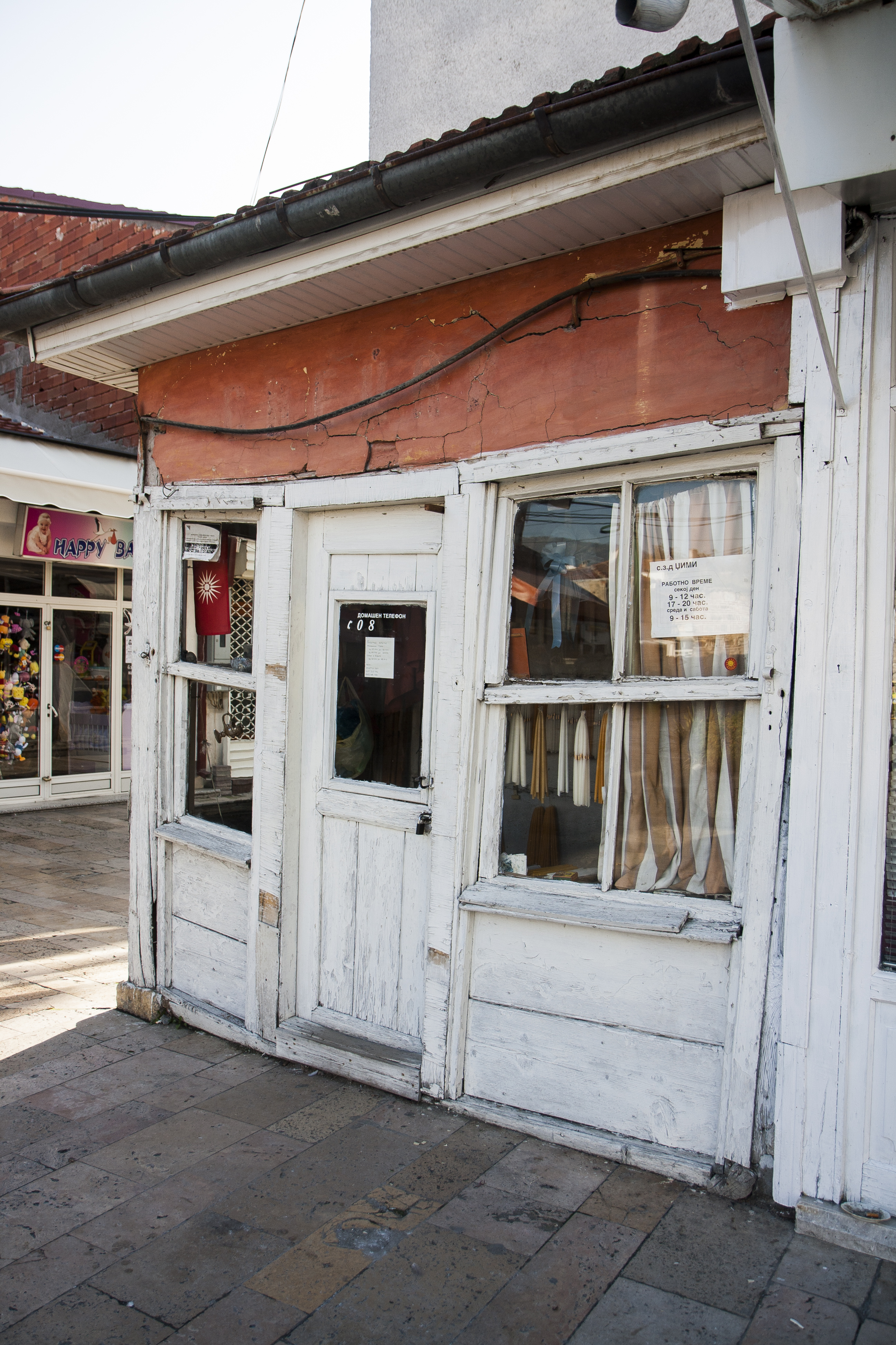 Дуќан за свеќи, ул Блаже Крсточанец бр.1